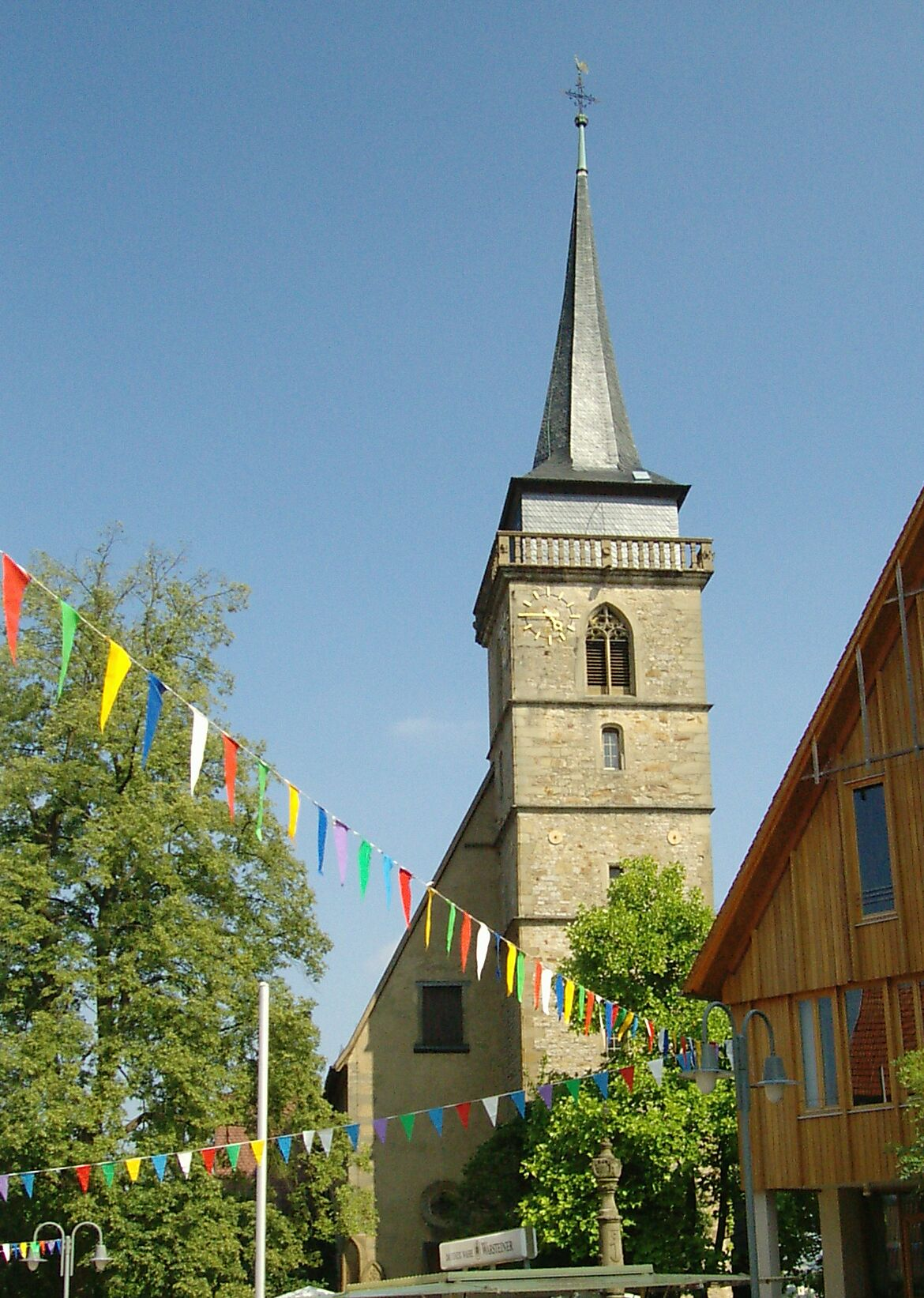 Ingersheim, Germany: Martinskirche Großingersheim